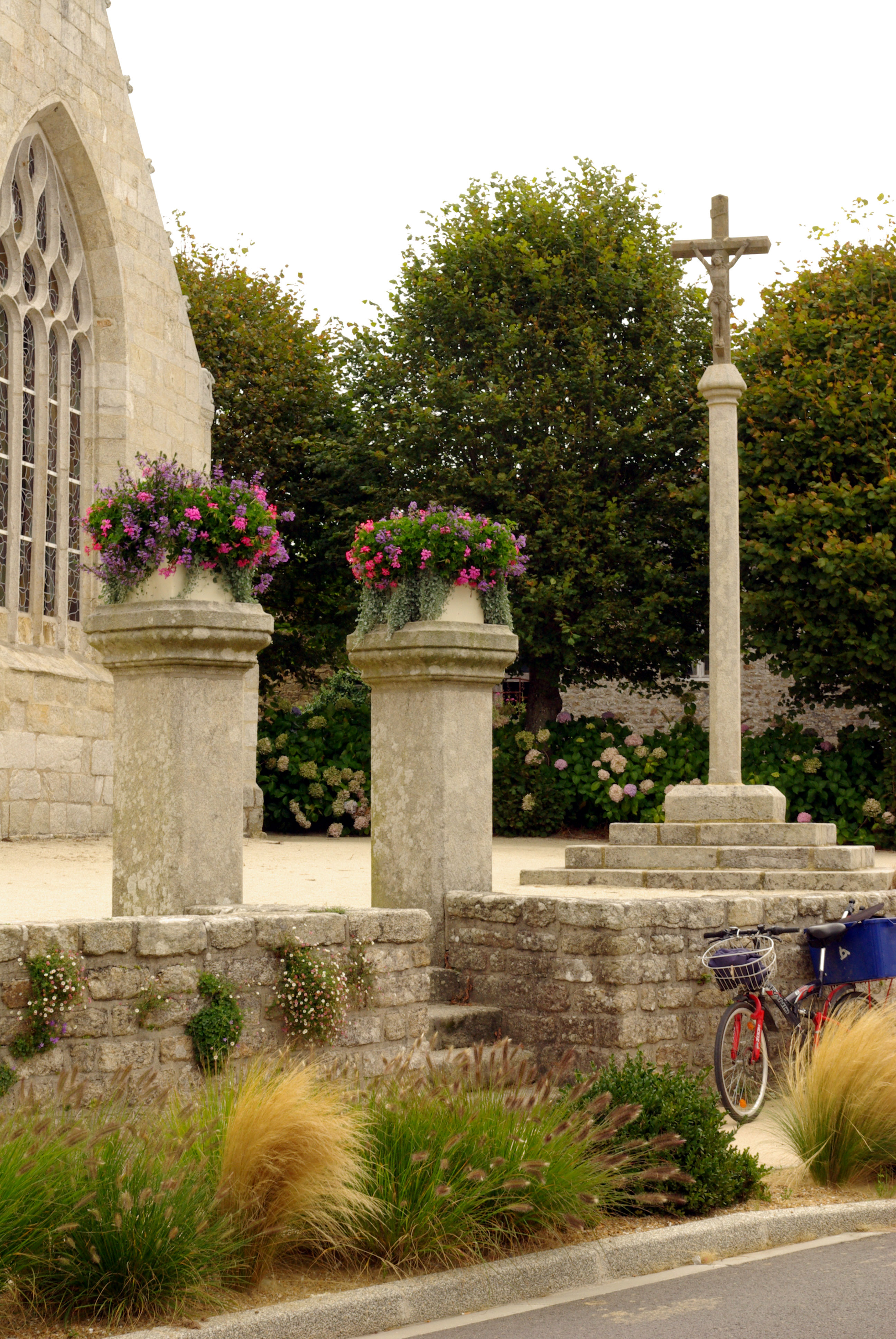 Calvarie van Sint-Tugdual Kerk in Combrit, department of Finistère, France